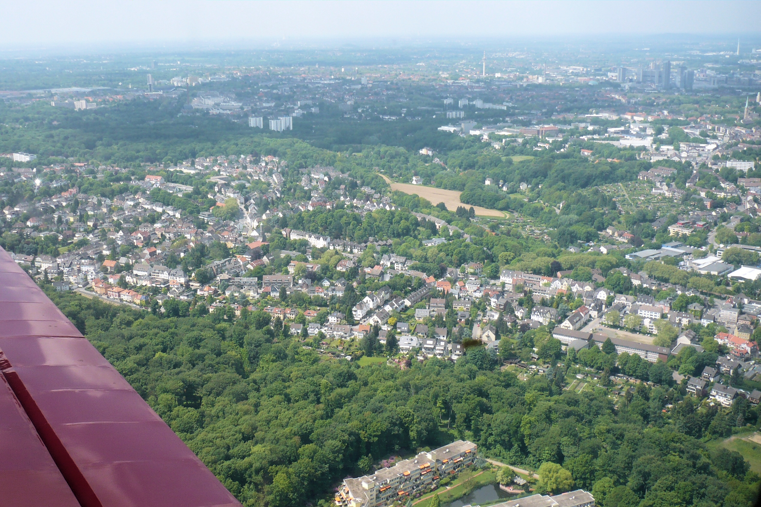 Essen-Rellinghausen, Luftbild, Bilck von Südosten